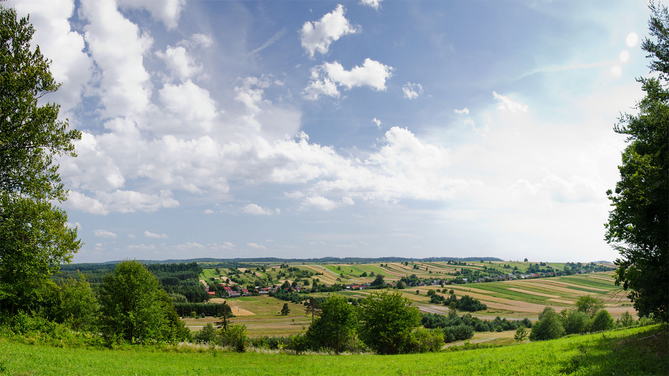 Widok z Bukowej Góry w Zwierzyńcu na Roztoczu.